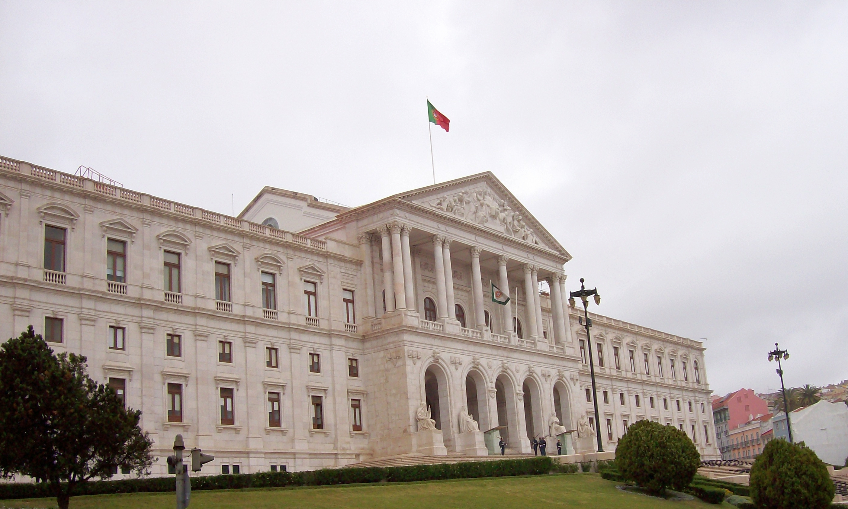 Palácio de São Bento in Lissabon (Portugal). Sitz des portugiesischen Parlaments (Assembleia da República) und des Premierminister.